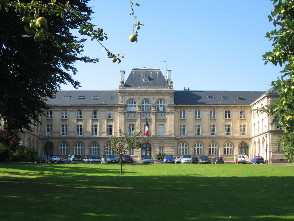 Rectorat de Caen, ancienne école normale d'instituteurs construite entre 1883 et 1887 sur les plans de l'architecte départemental Léon Marcotte revus à la baisse par Auguste Nicolas.